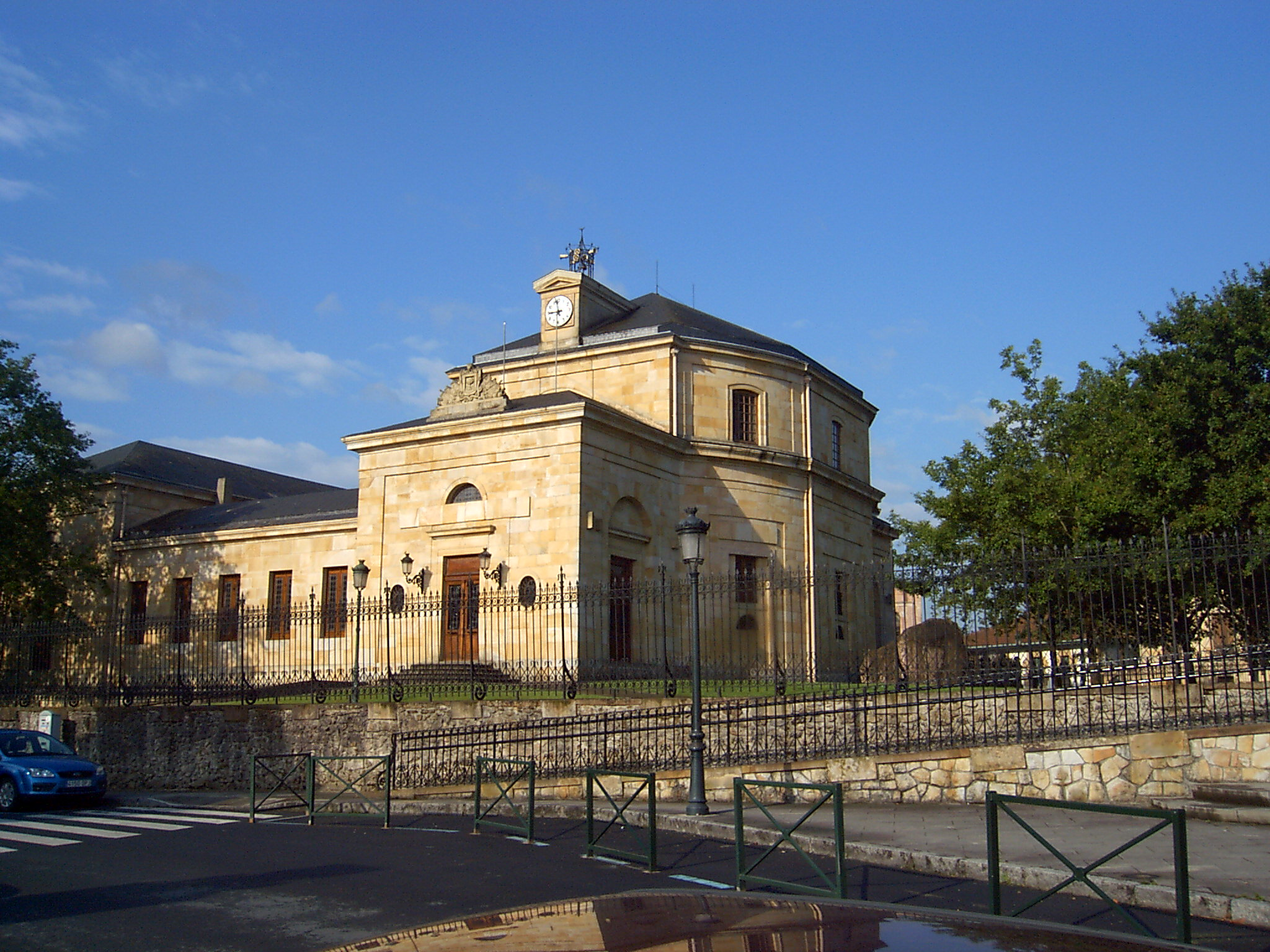 Gernika. Batzar nagusiak